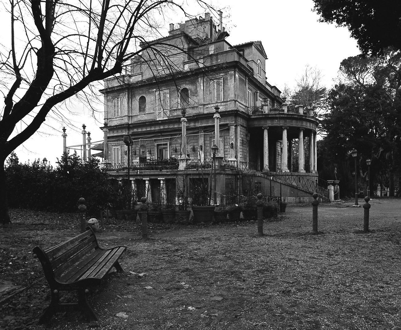 La Casina Valadier nel periodo dell'abbandono (gestione Ciarrapico/Italfin80)